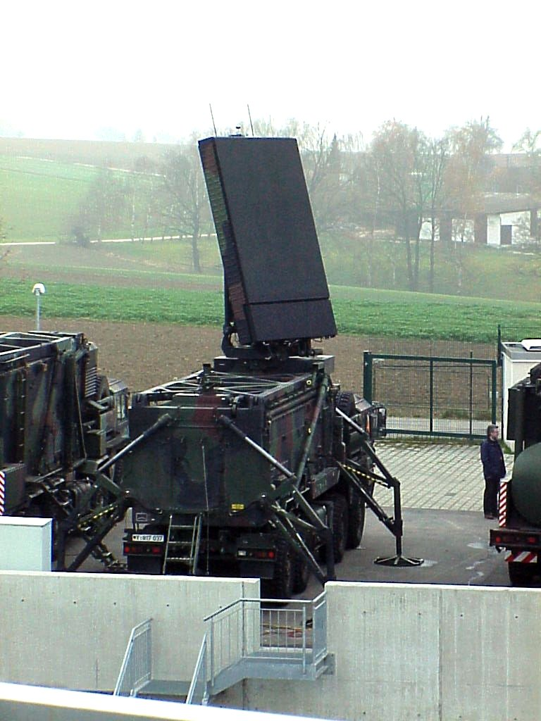 Radargerät LÜR